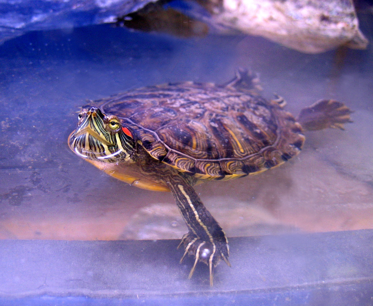 Żółw czerwonolicy Trachemys scripta elegans